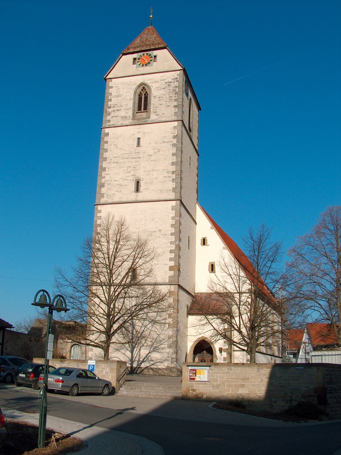 Die evangelische St.-Veit-Kirche in Gärtringen